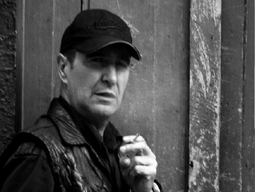 Durante la grabacion de su album "Nomada (Camello de Sueños)"